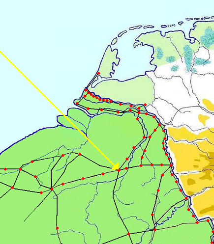 Aangepaste tekening van de Nederlanden in de Romeinse tijd, vereenvoudigde versie met wegen en nederzettingen